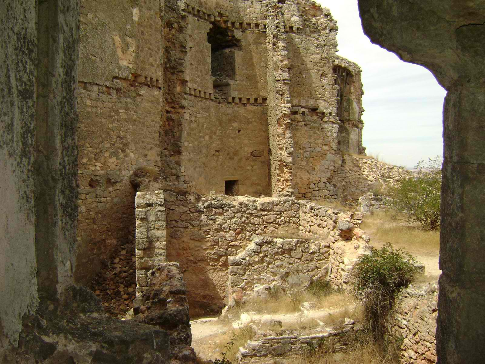 Vista lateral del distribuidor de circulación. A la derecha el patio enlosado. Escaleras abajo caballerizas